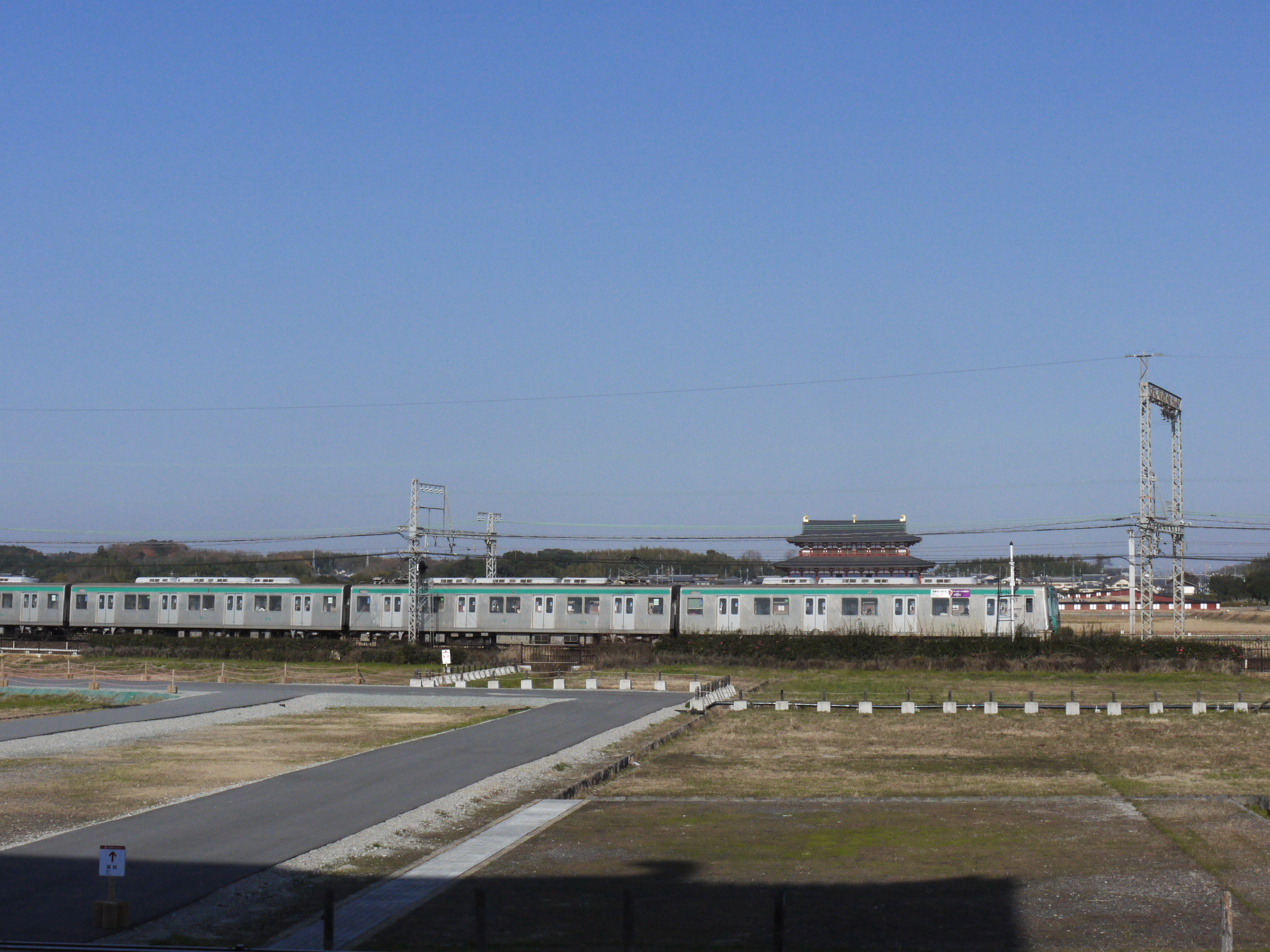 平城宮跡を横切る近鉄奈良線